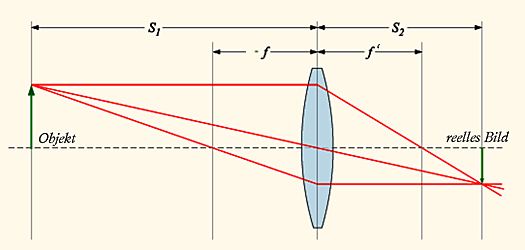 reelles Bild an einer Sammellinse